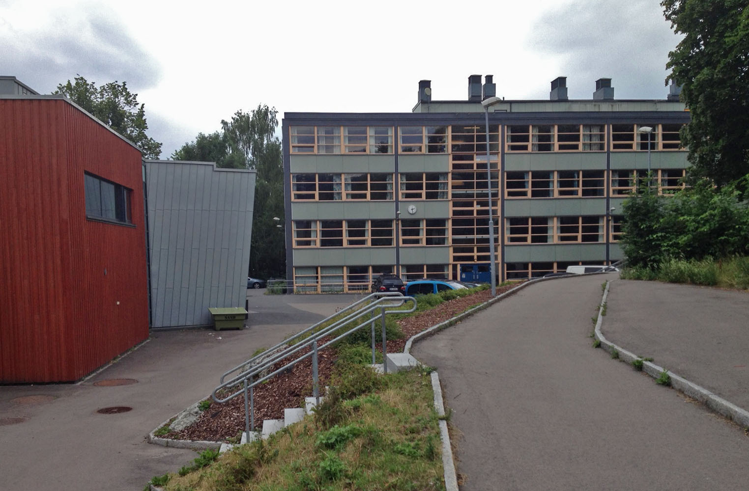 Hovseter skole, Oslo